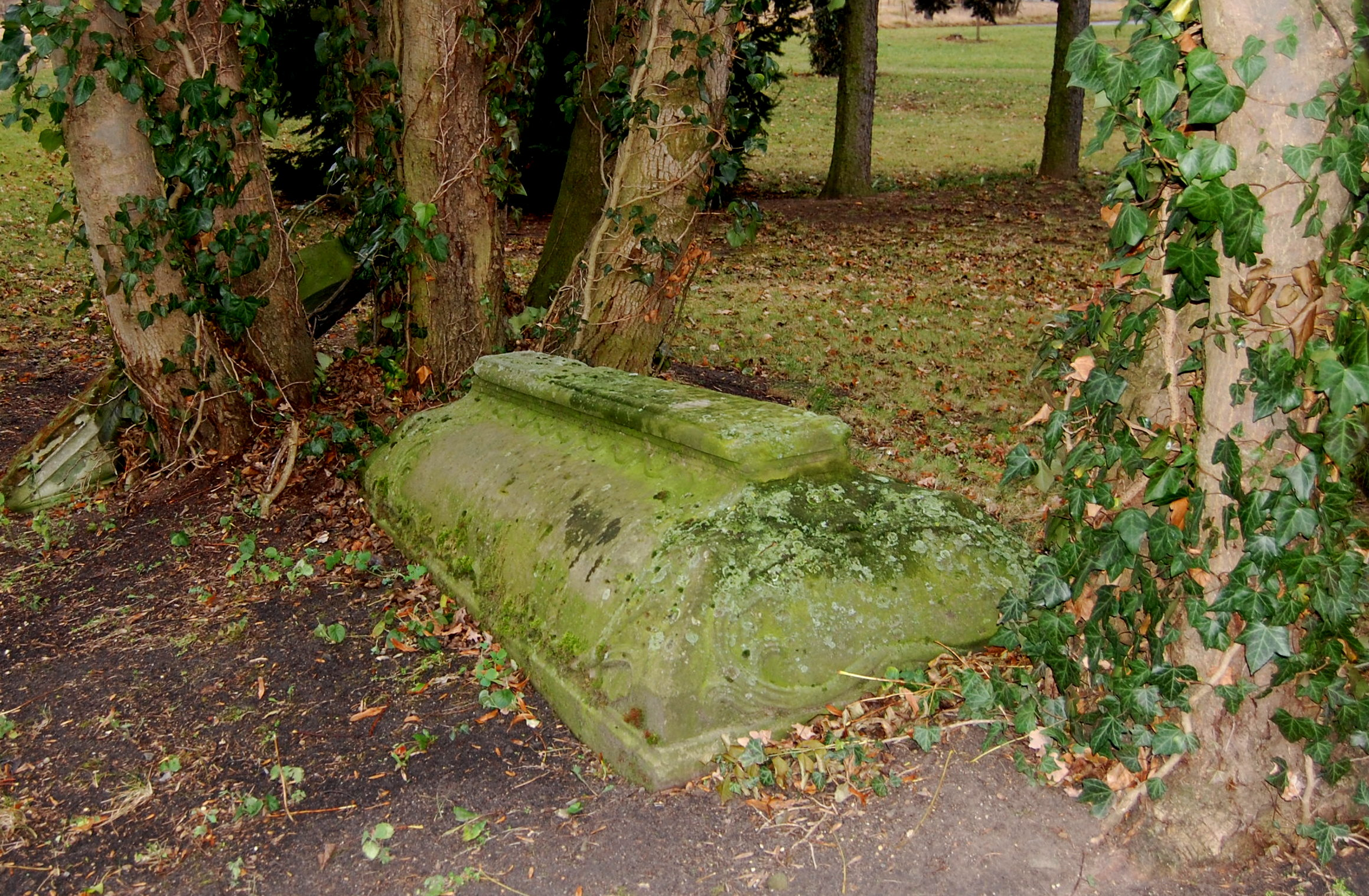 Sandsteinsarkopharg auf dem Kirchhof in Jersleben